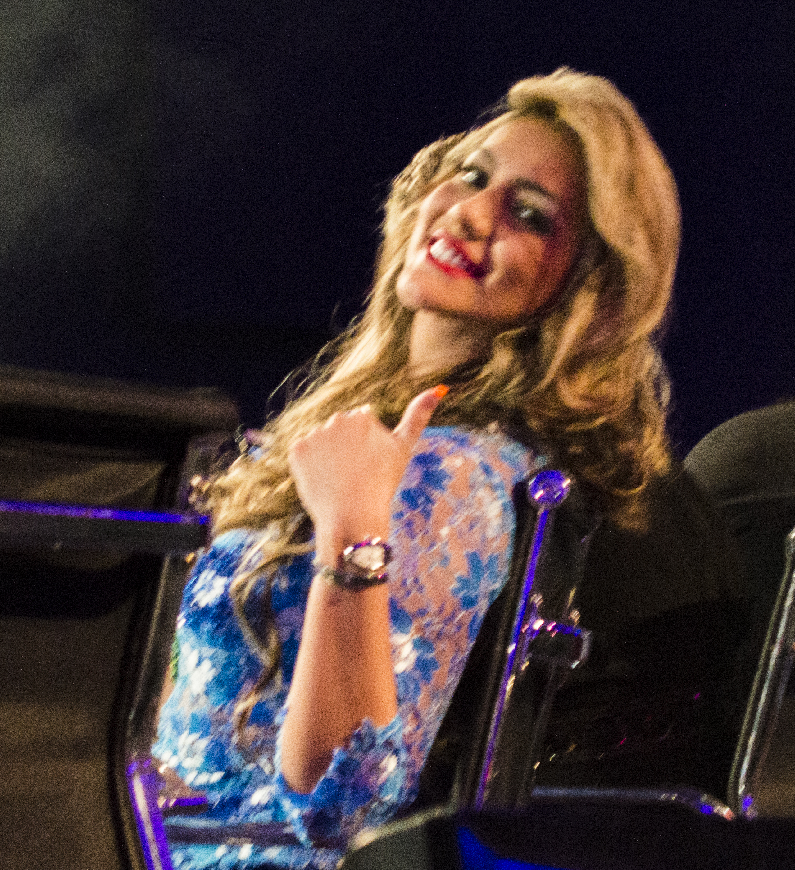 María Fernanda Ríos como jurado de Ecuador Tiene Talento 3 el 26 de octubre de 2014.